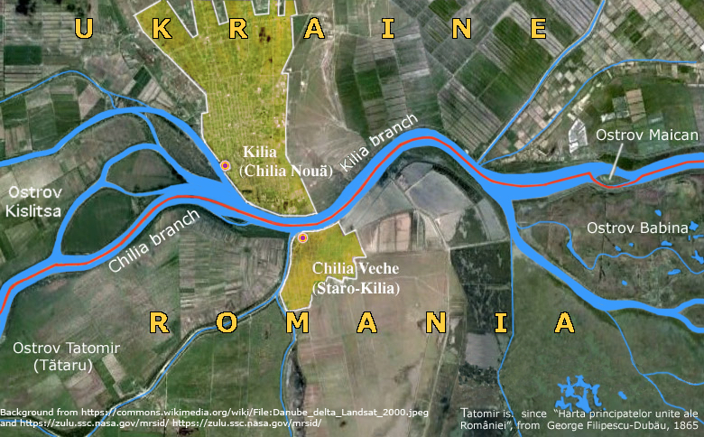 The Kilia-Chilia danubian arm, in the area of Kilia and Chilia Veche (background: part of the Landsat satellite photo File:Danube delta Landsat 2000.jpeg uploaded by User:Balcer~commonswiki [1]) from Other details since the official maps of Ukraine ans Romania.